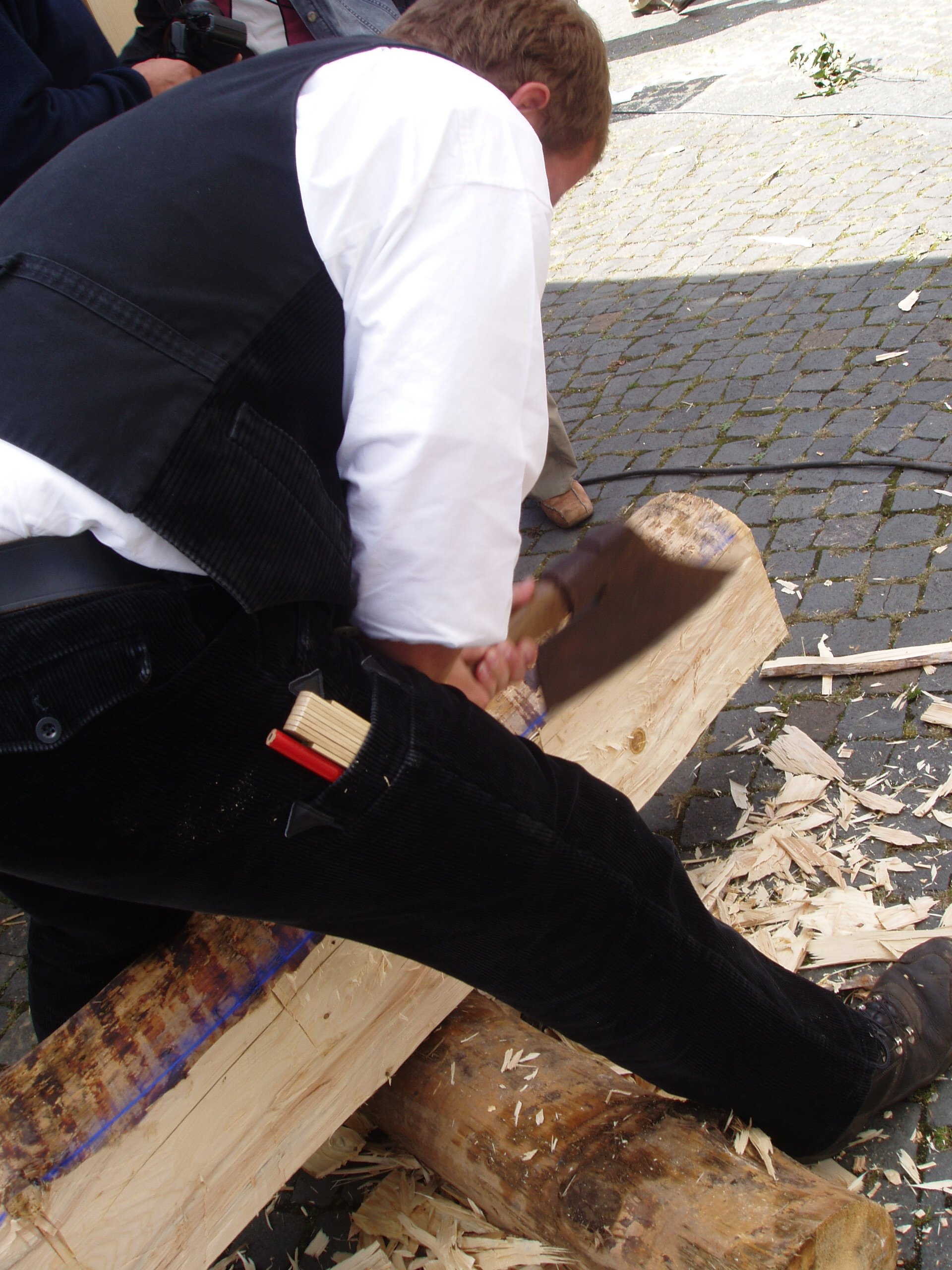 Balkenherstellung Fachwerk